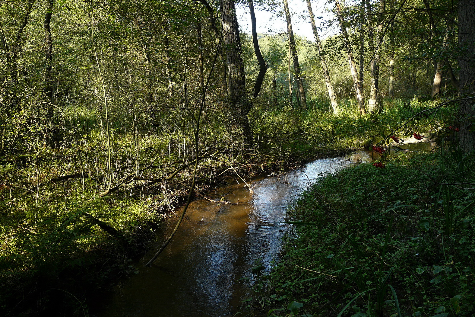 Potok Jordánka